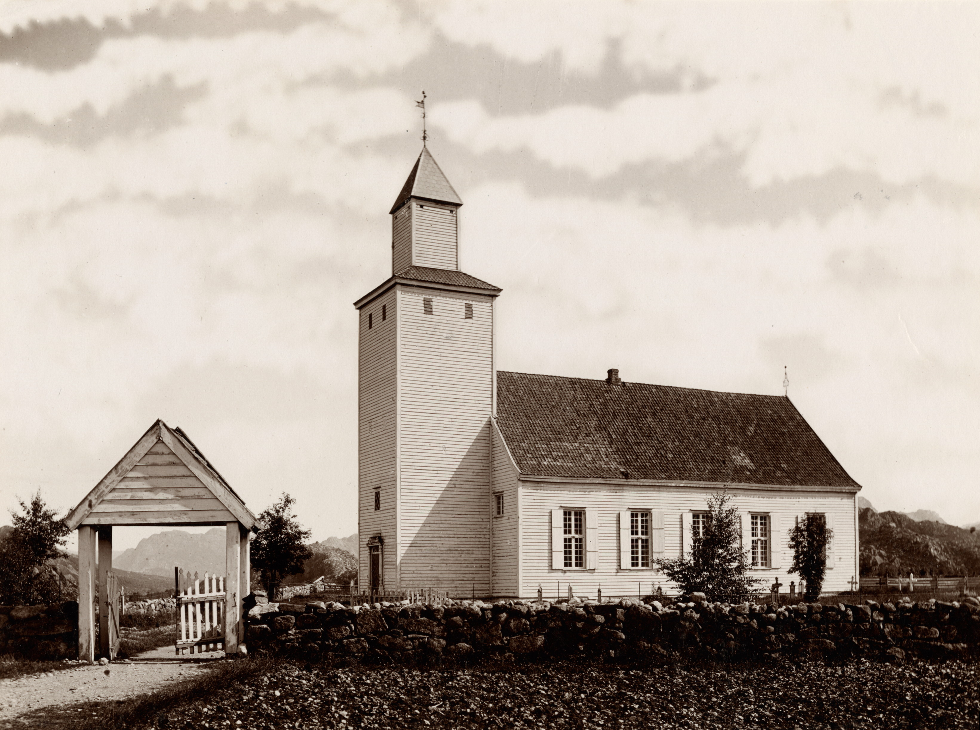 Bjerkreim kirke. Foto: C. Christensen Thomhav. Fra Riksantikvarens Kulturminnesøk.